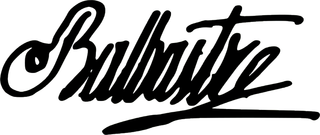 Signature de Claude Balbastre